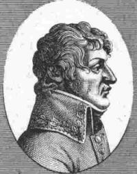 Général_Philibert_Duhesme.jpg